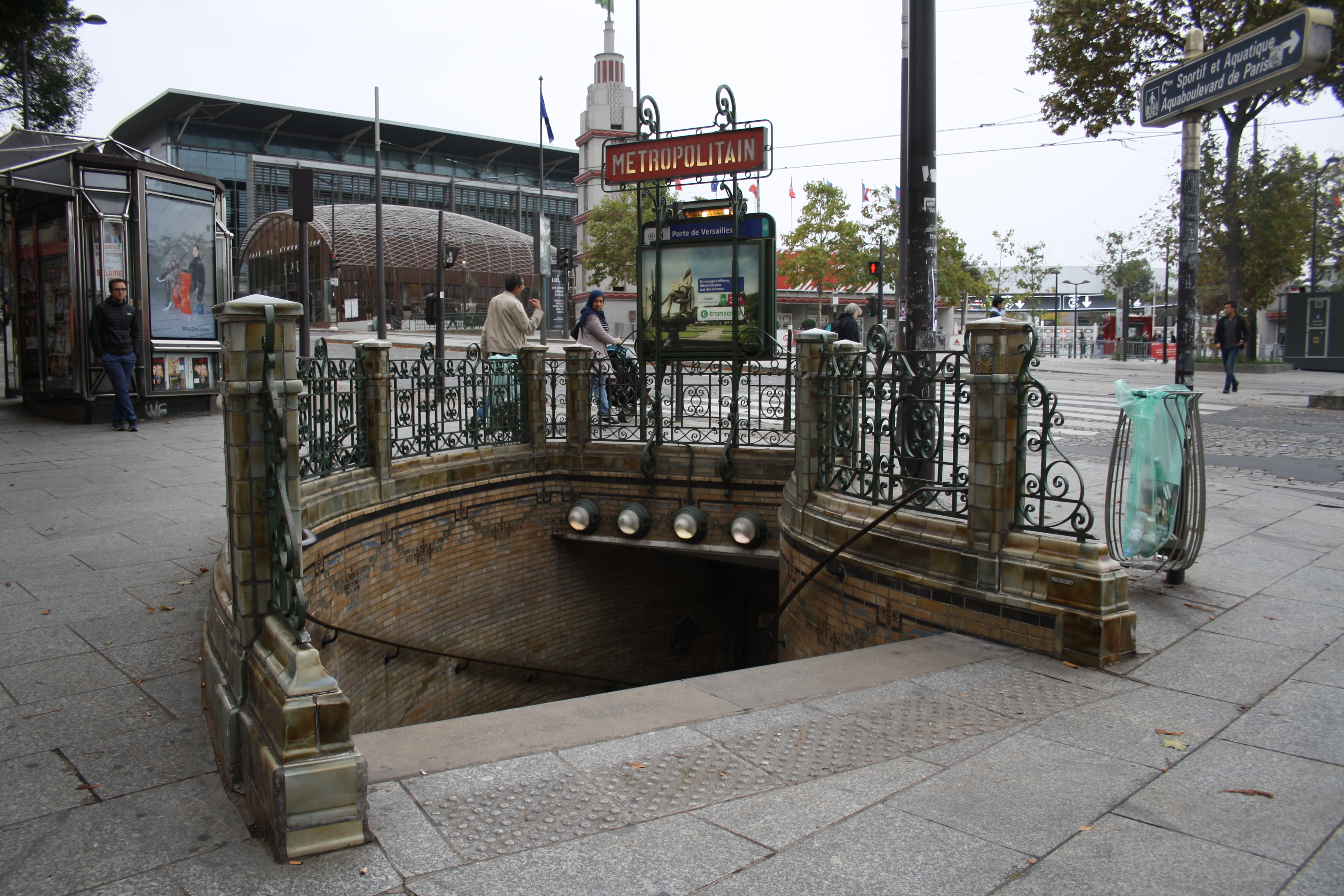 Accès à la station Porte de Versailles